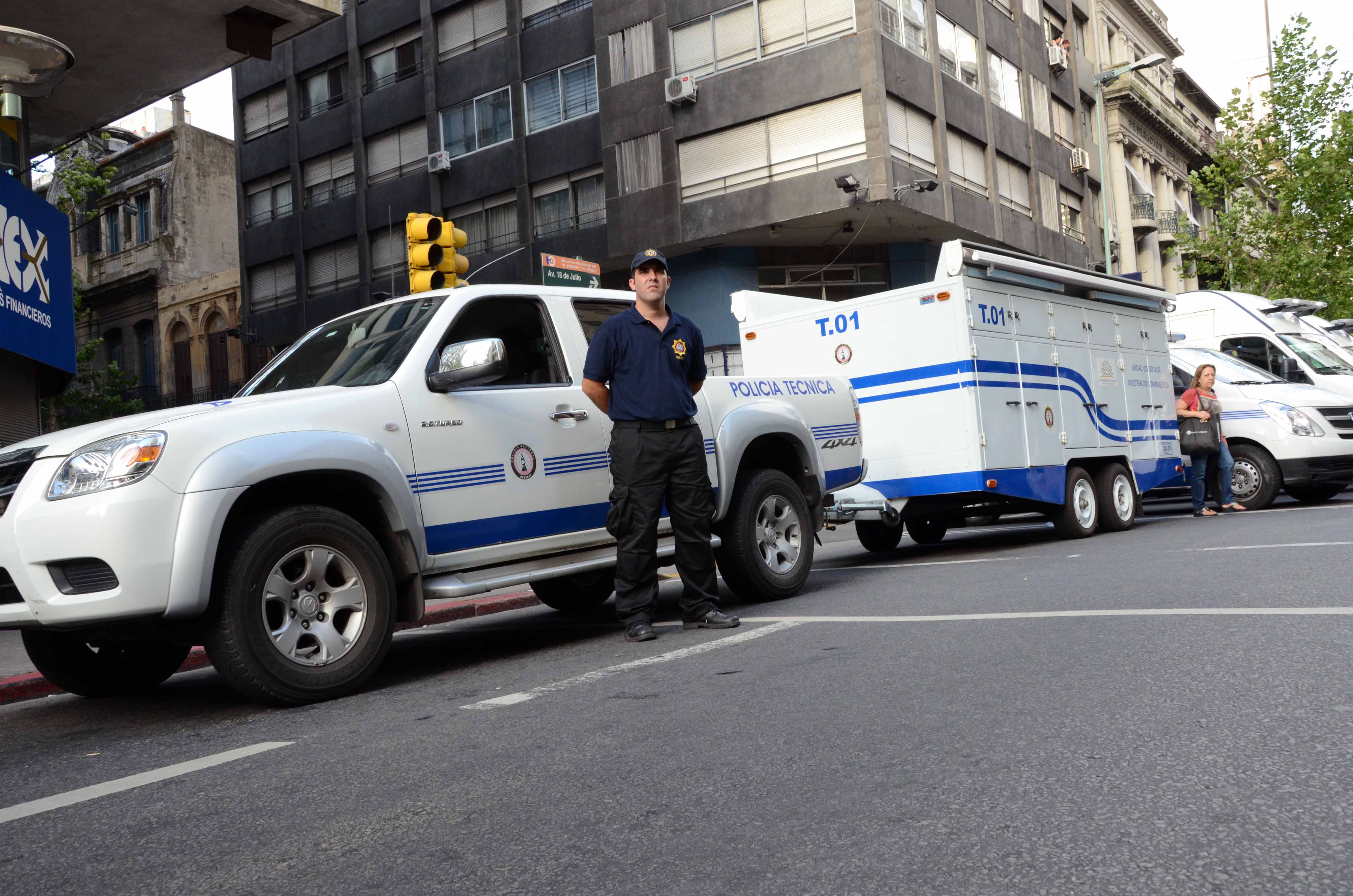 Día de la Policía Nacional (Uruguay) 18 diciembre 2013 - Actos protocolares en Plaza Independencia en la ciudad de Montevideo.